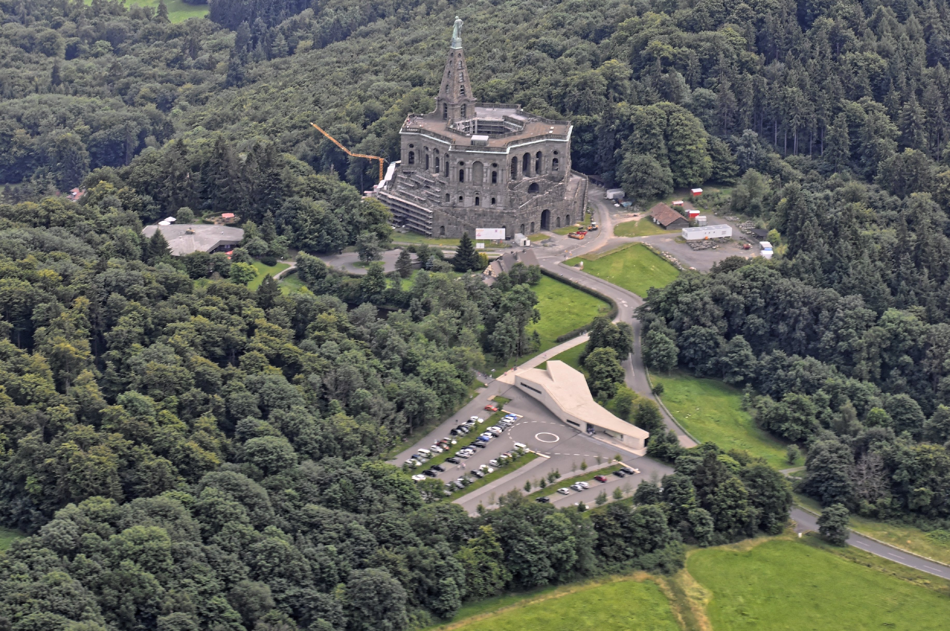 Bilder vom Flug Nordholz-Hammelburg 2015: Der Herkules im Bergpark Wilhelmshöhe